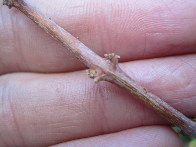 este es el detalle,de la espina de f. lycioides